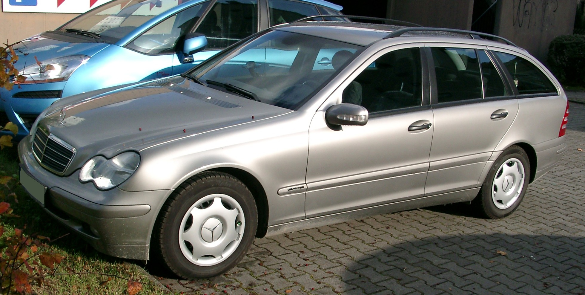 Mercedes-Benz S203 (T-Modell)